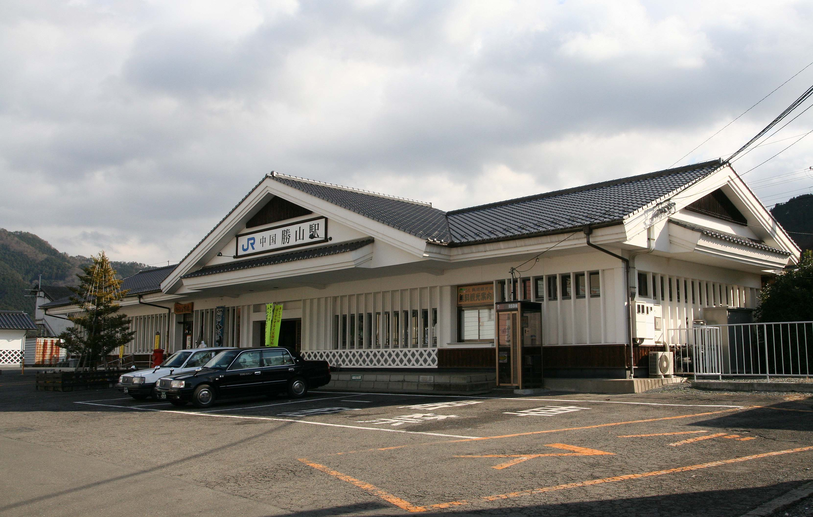 中国勝山駅の駅舎